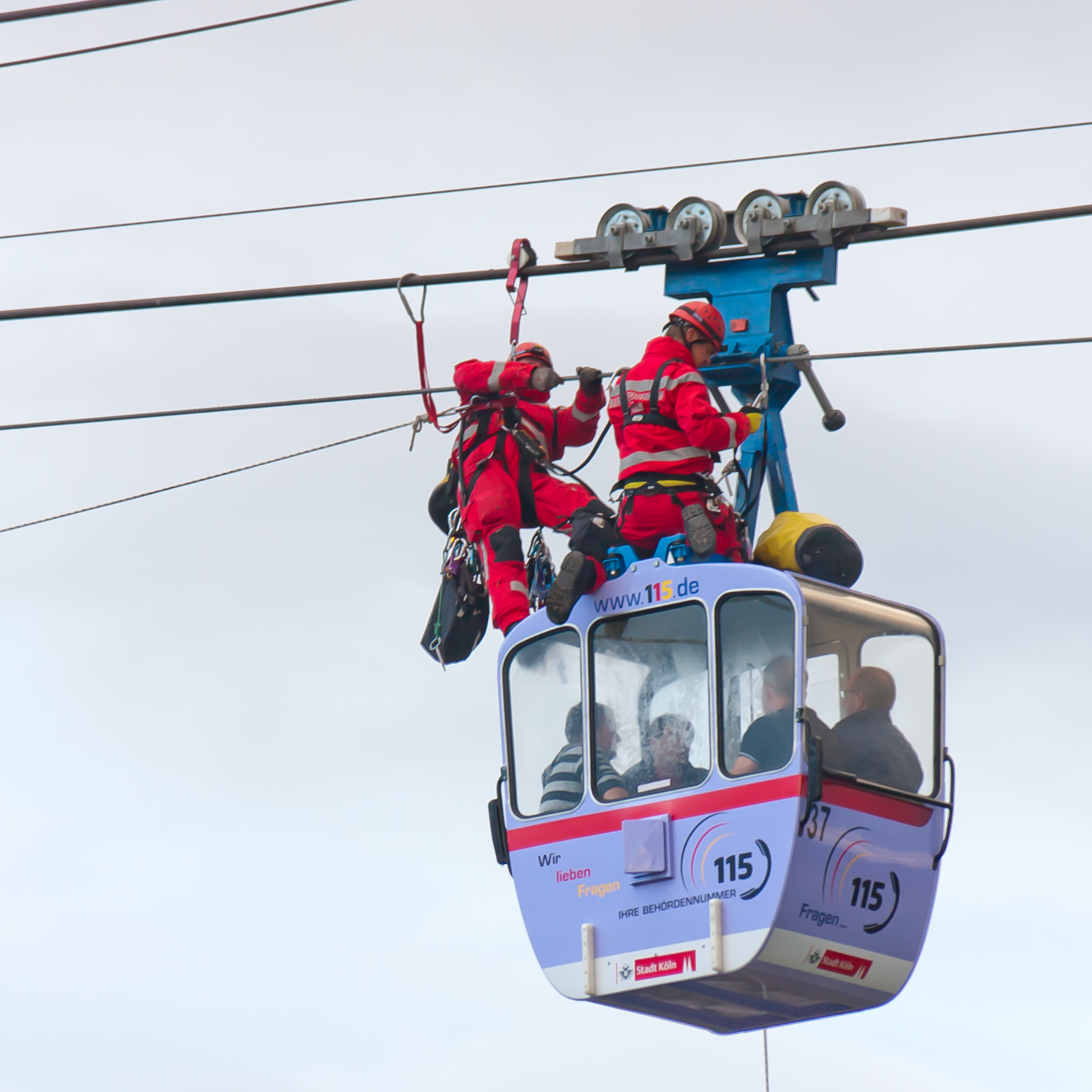 Höhenrettungsübung der Feuerwehr Köln an der Seilbahn über den Rhein. Die Gondel ist mit Werbung für die Einheitliche Behördenrufnummer 115 versehen.